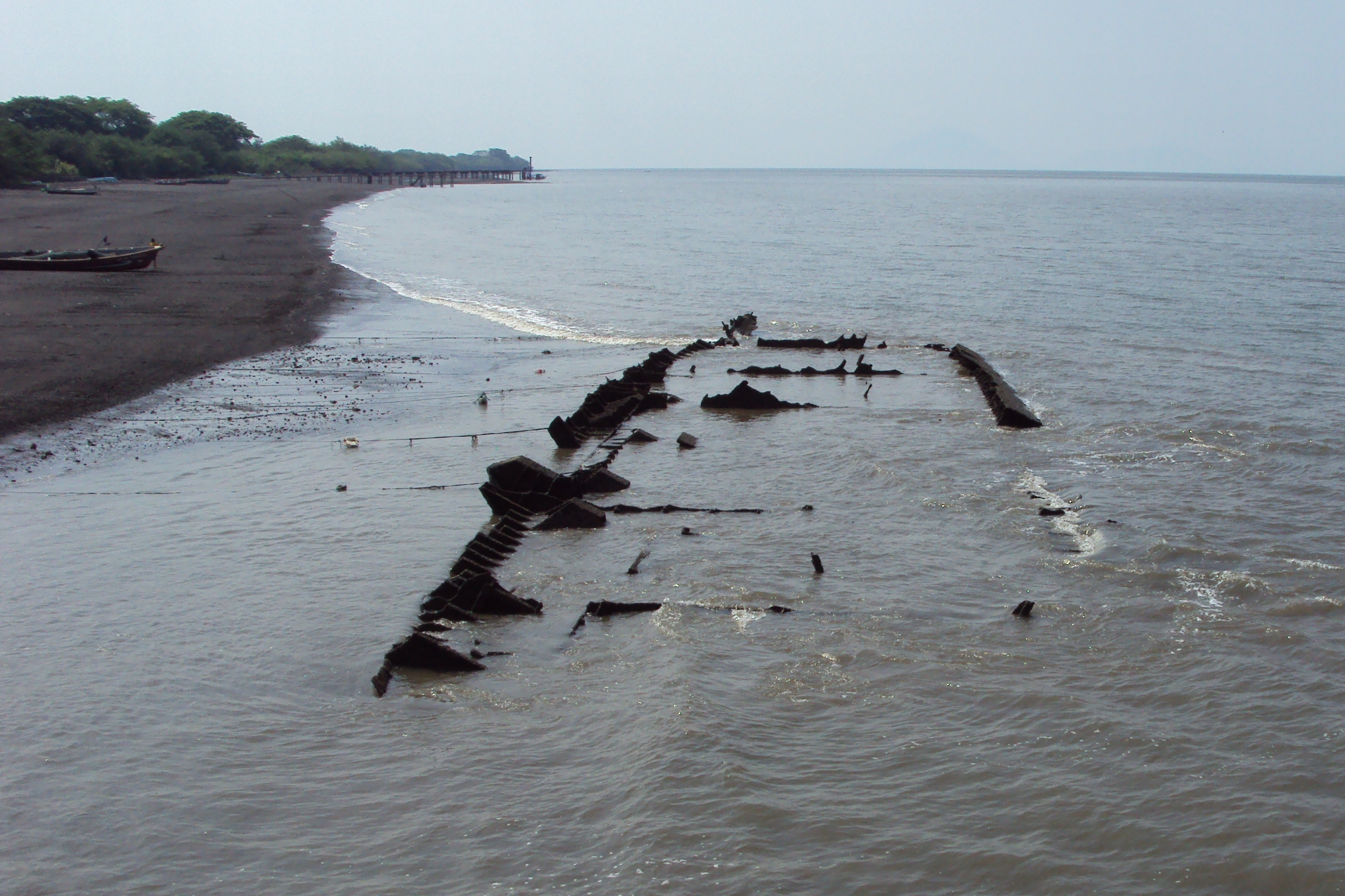 Junto al muelle de potosi, se puede apreciar los restos de un barco. Golfo de Fonseca, El Viejo, Chinandega, Nicaragua